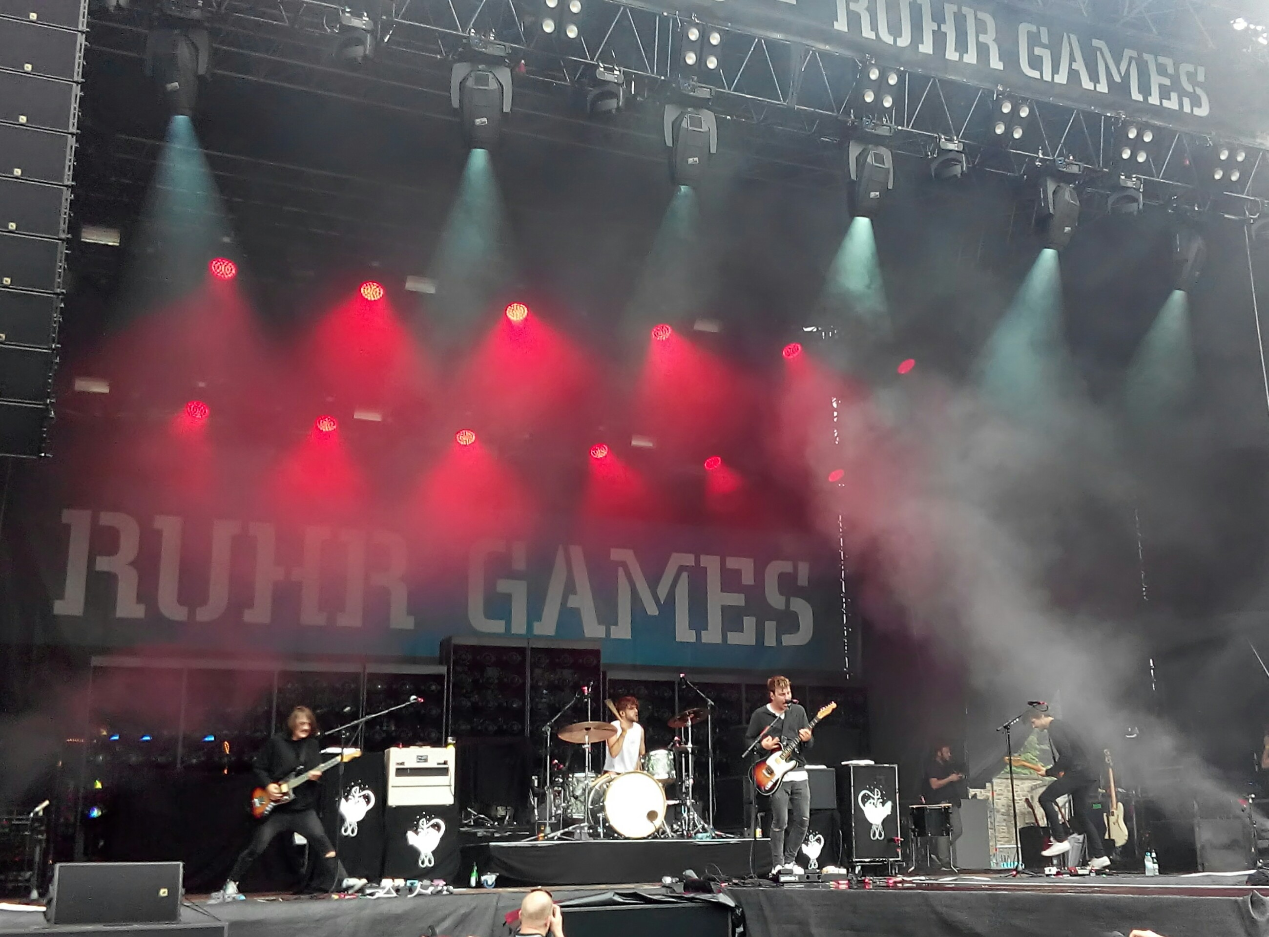 Blackout Problems auf den Ruhr Gamescom 2017 in Dortmund